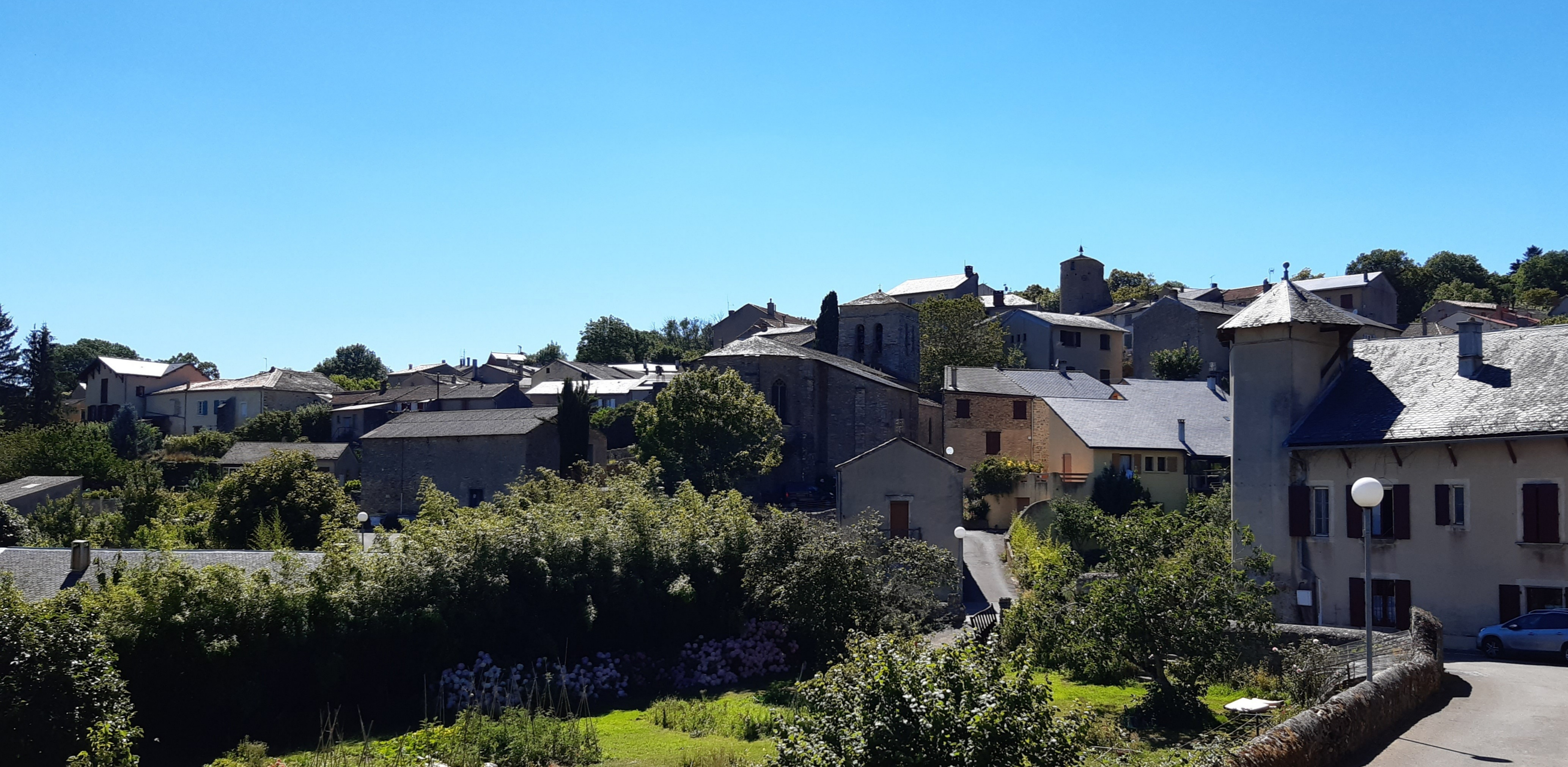 Vue générale du village de Fontiers-Cabardès en juillet 2020